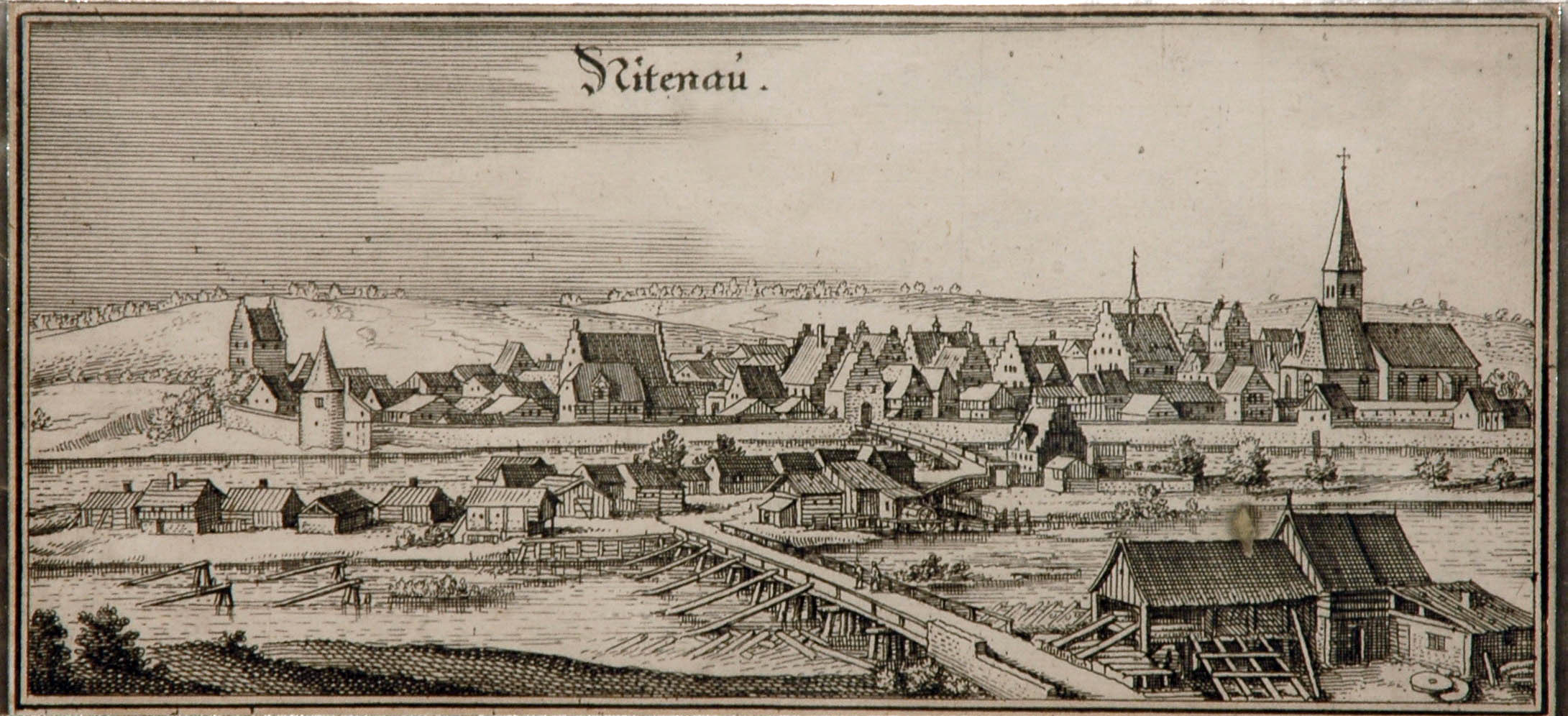 Nittenau um 1650; Kupferstich 8 x 17 cm von Matthäus Merian 1647